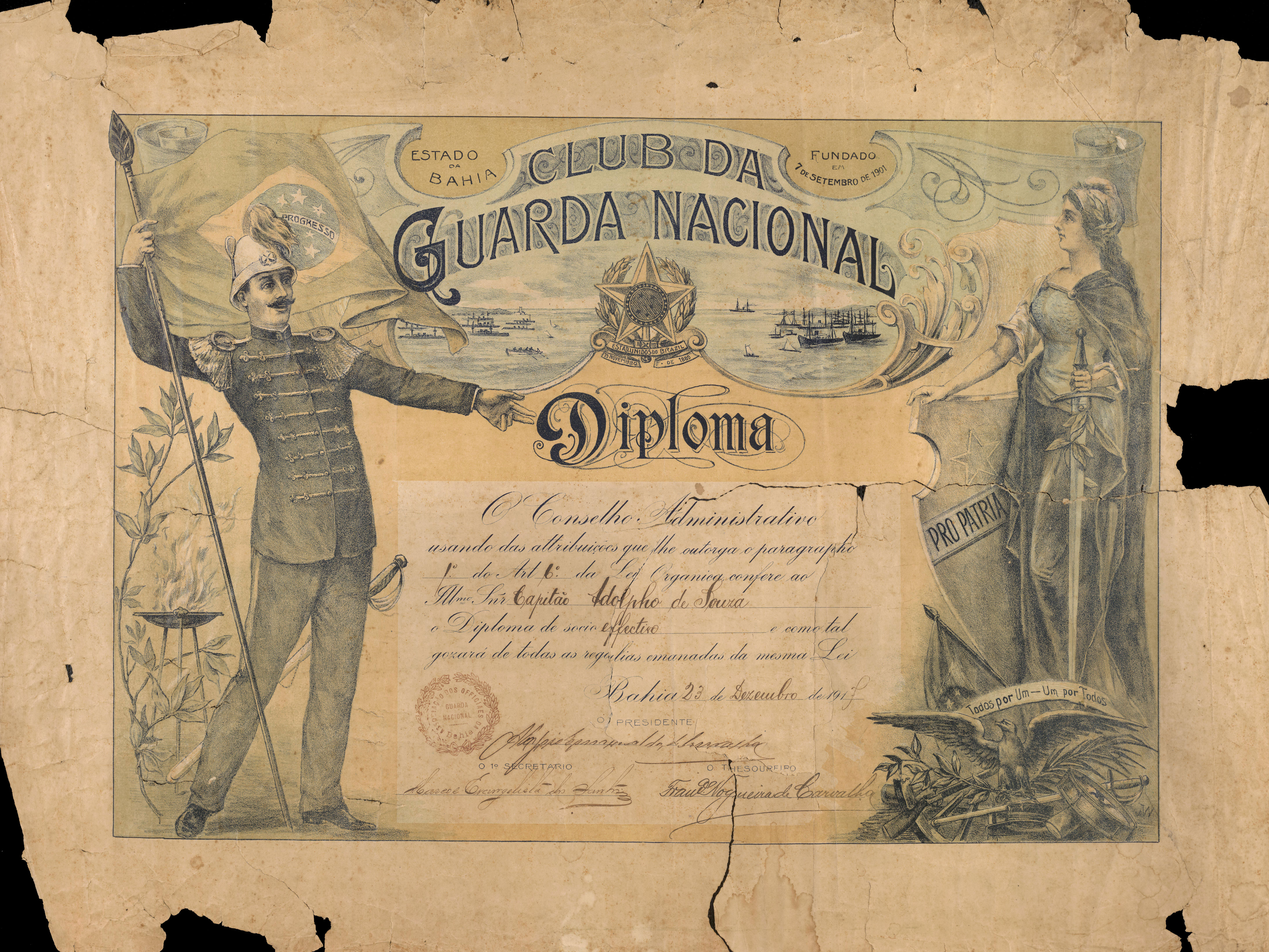 Antigo diploma do Clube da Guarda Nacional na Bahia.